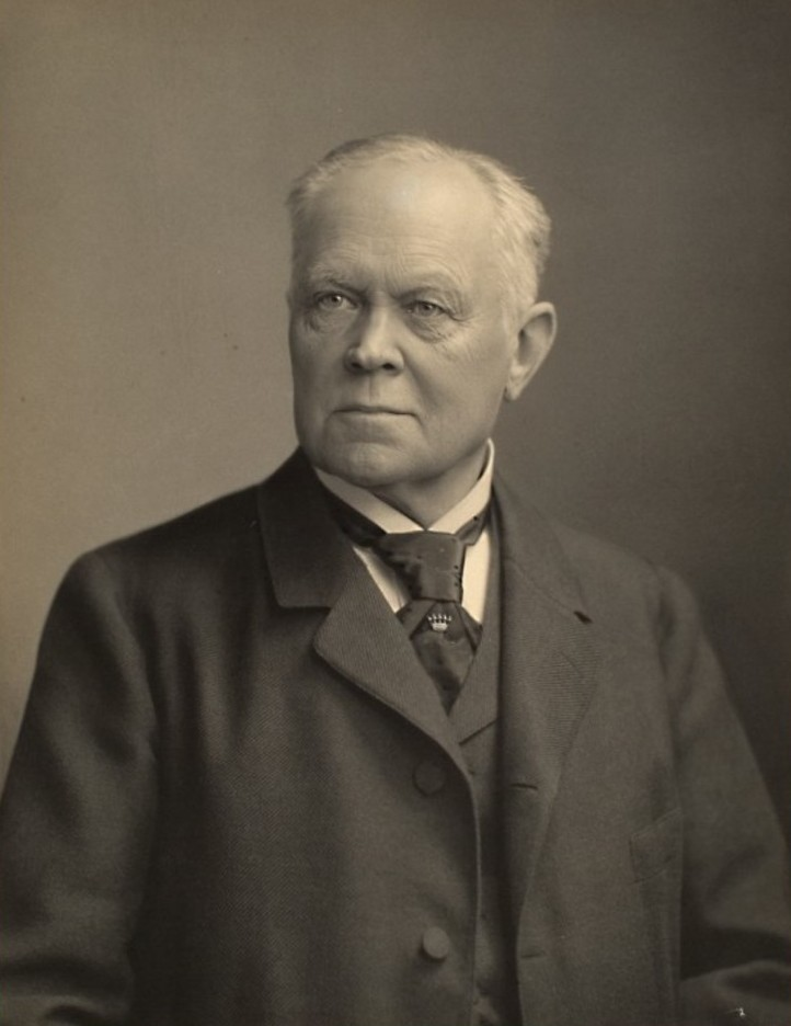 Ernst Kuno Berthold Fischer, Philosoph, 1872–1906 Professor in Heidelberg